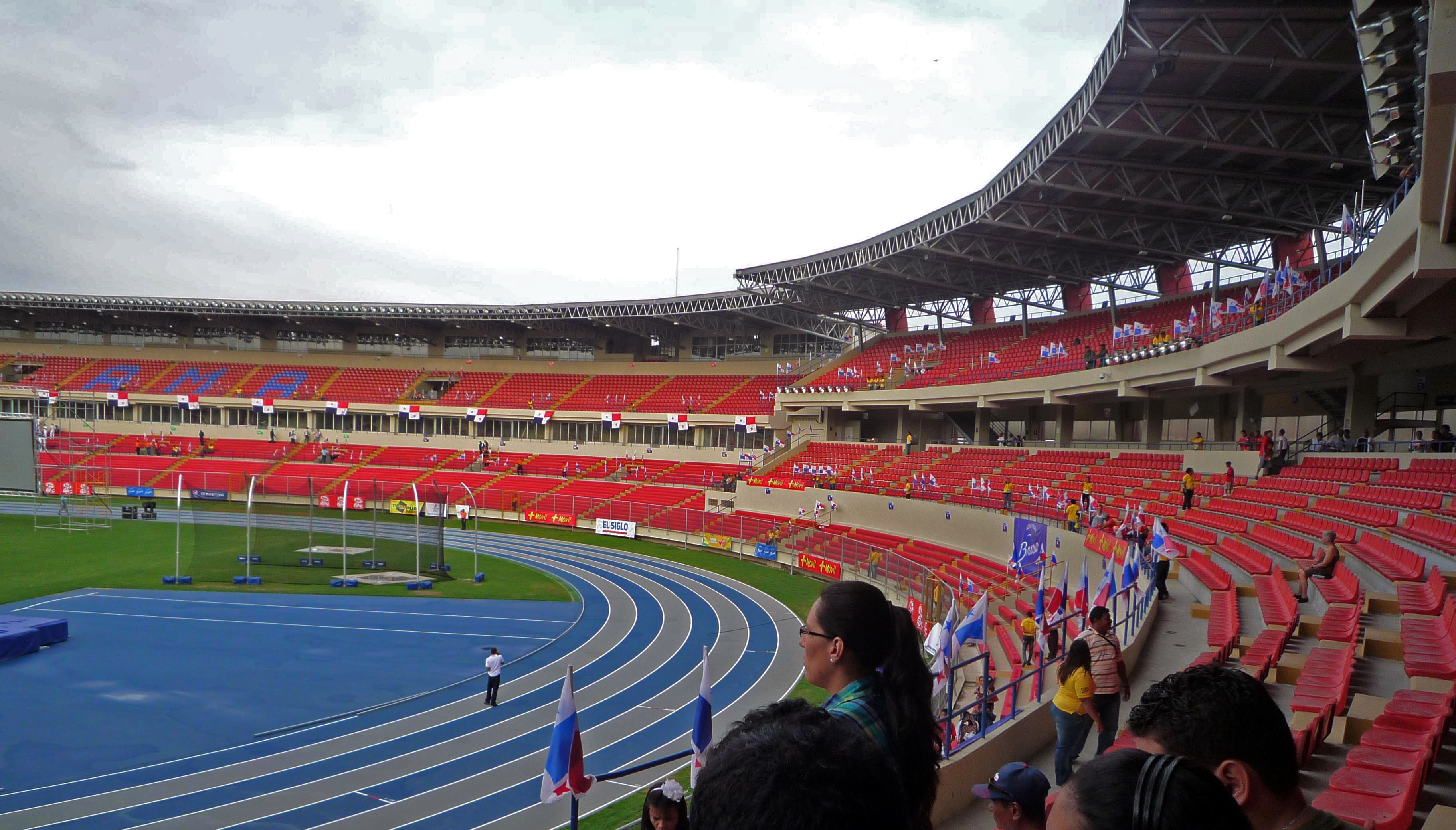 Estadio Rommel Fernández, ciudad de Panamá.